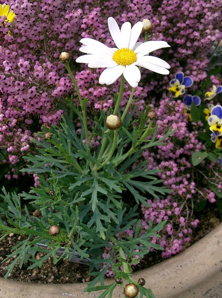 Argyranthemum frutescens